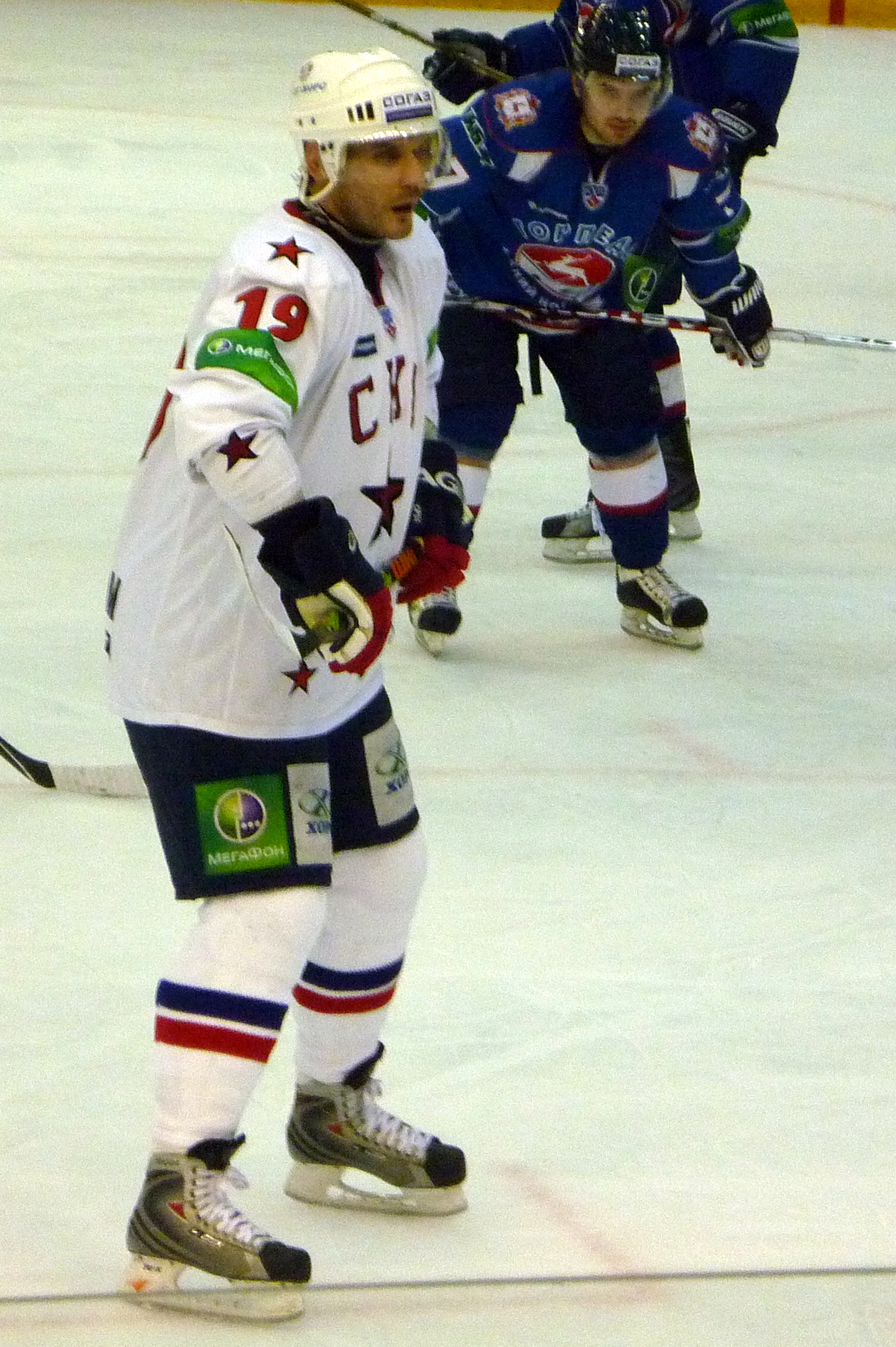 Нападающий СКА СПб Алексей Яшин во время игры с нижегородским «Торпедо» 12 декабря 2010